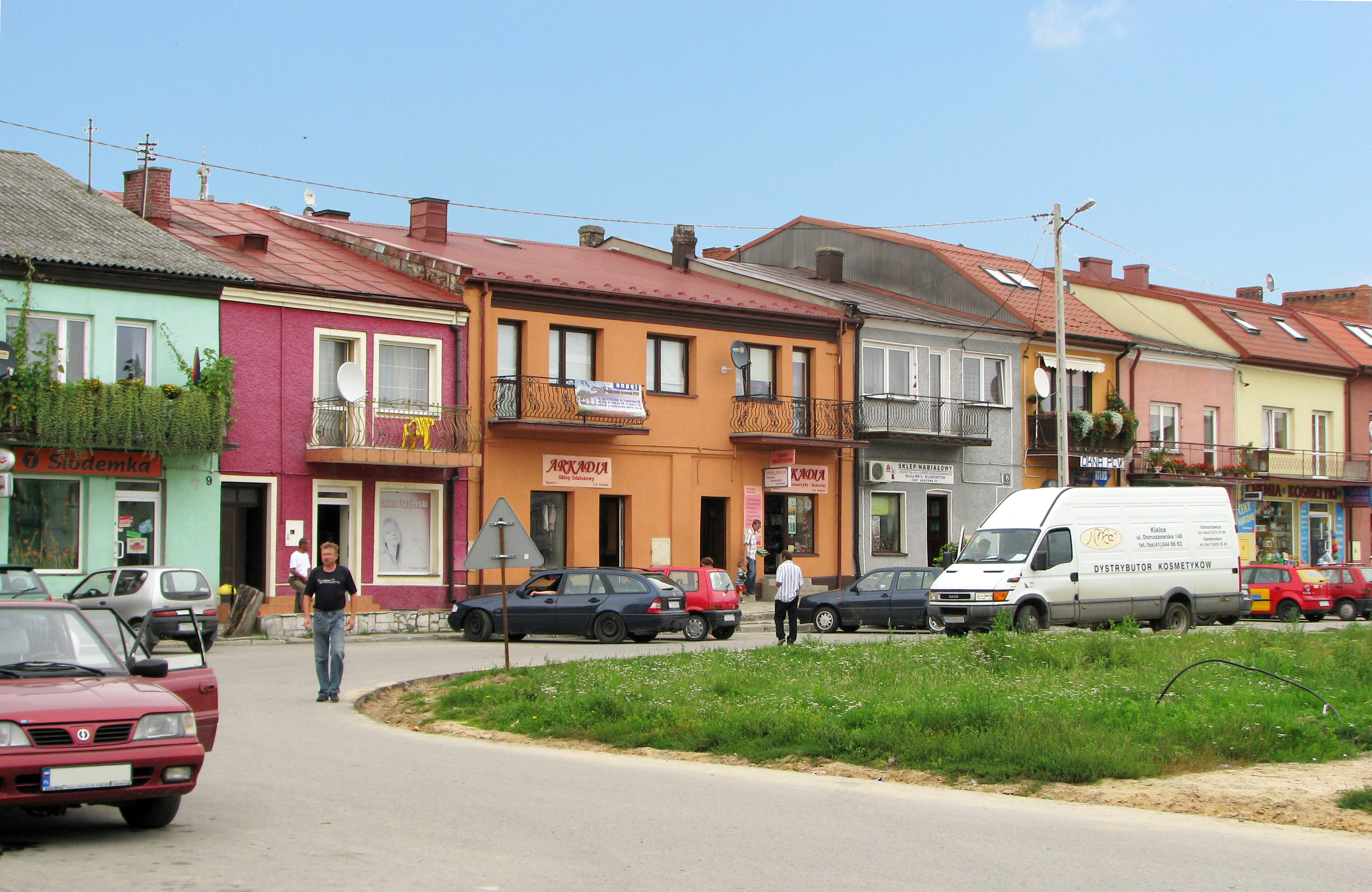 Zabytkowa zabudowa rynku w Klimontowie, w powiecie sandomierskim, Polska.